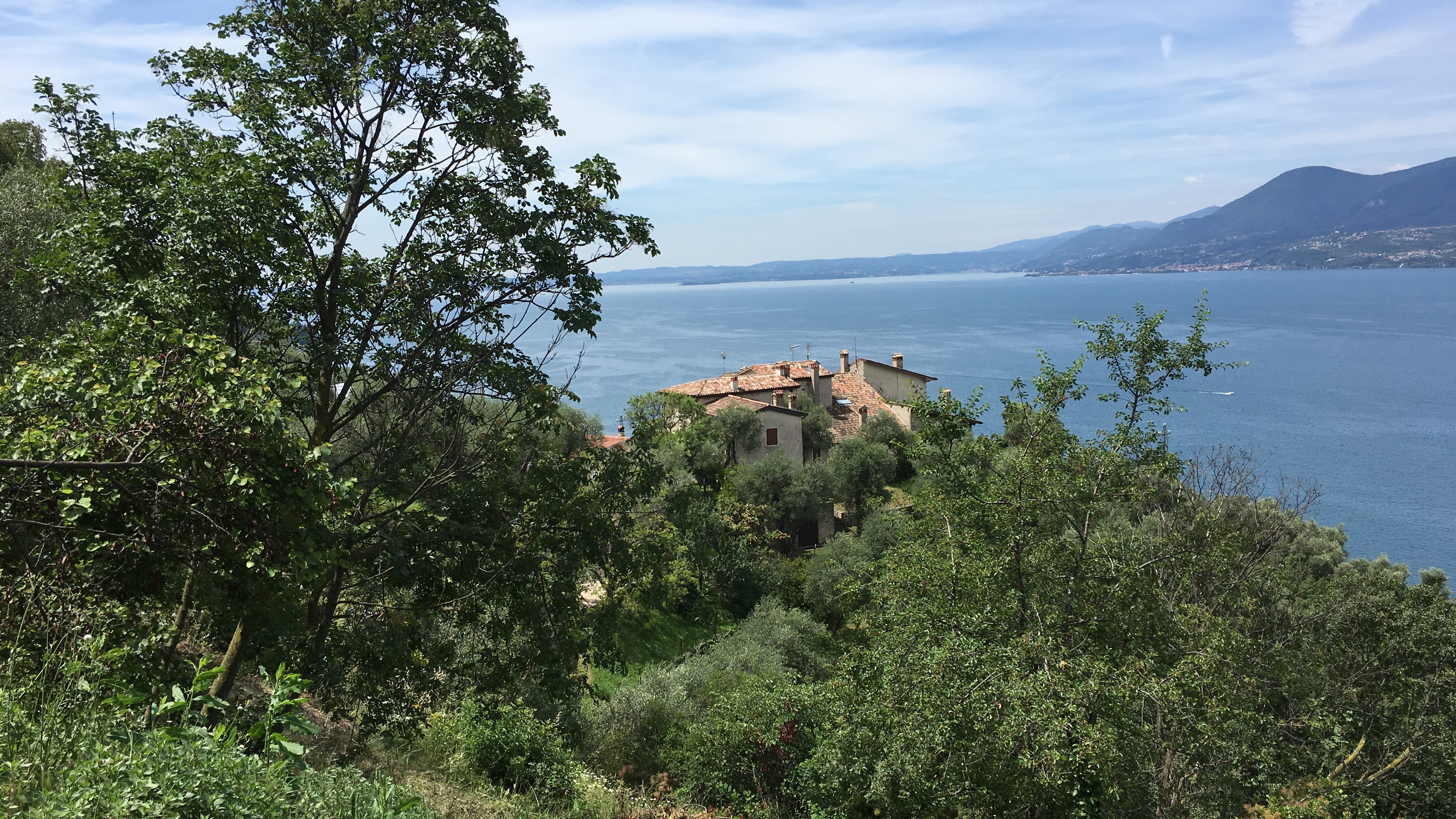 Ca' Tronconi